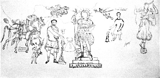 Desenho inacabado de influência palmirena encontrado em uma das salas que cercam o Templo de Azanatcona